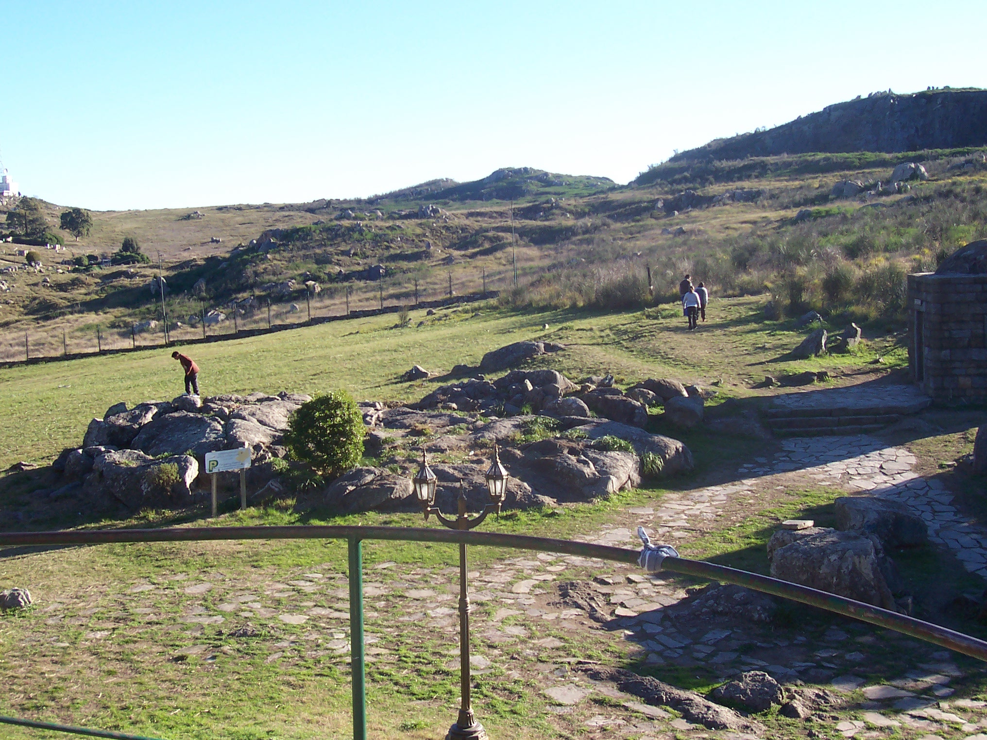 Fotografía del Monte Calvario, ciudad de Tandil, Buenos Aires, Argentina